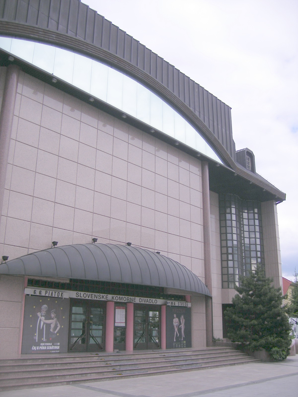 Martin - Slovenské komorné divadlo